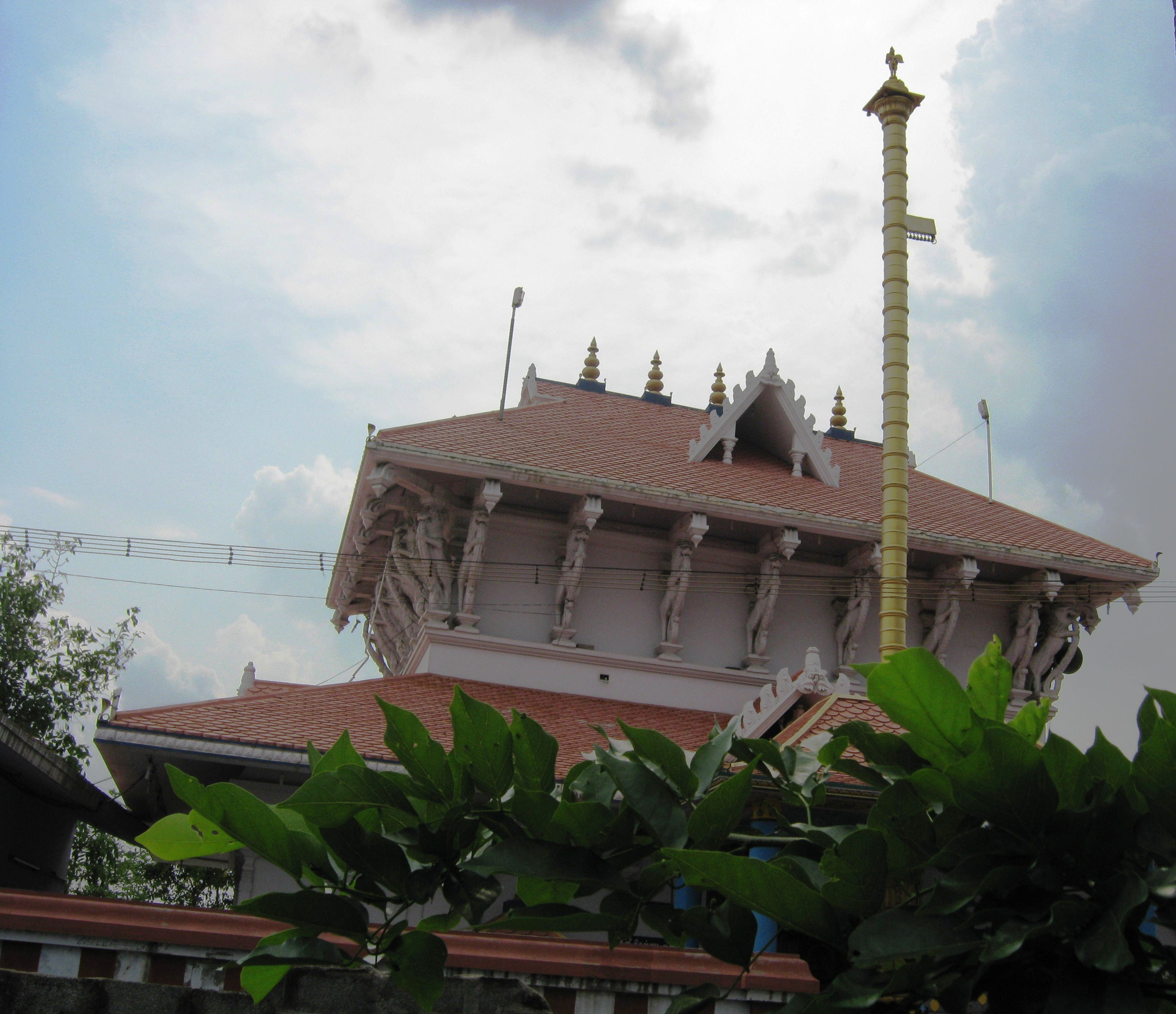 SREE GURUVAYURAPPAN TEMPLE, SALEM